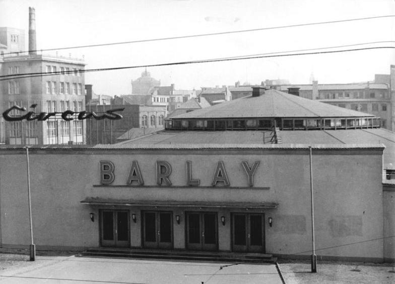 Berlin, Friedrichstraße, Zirkus Barlay Zentralbild Baier 16.4.1958 Berlin, Deutschlands Hauptstadt Das Gebäude des volkseigenen Zirkus Barley in der Friedrichstrasse.